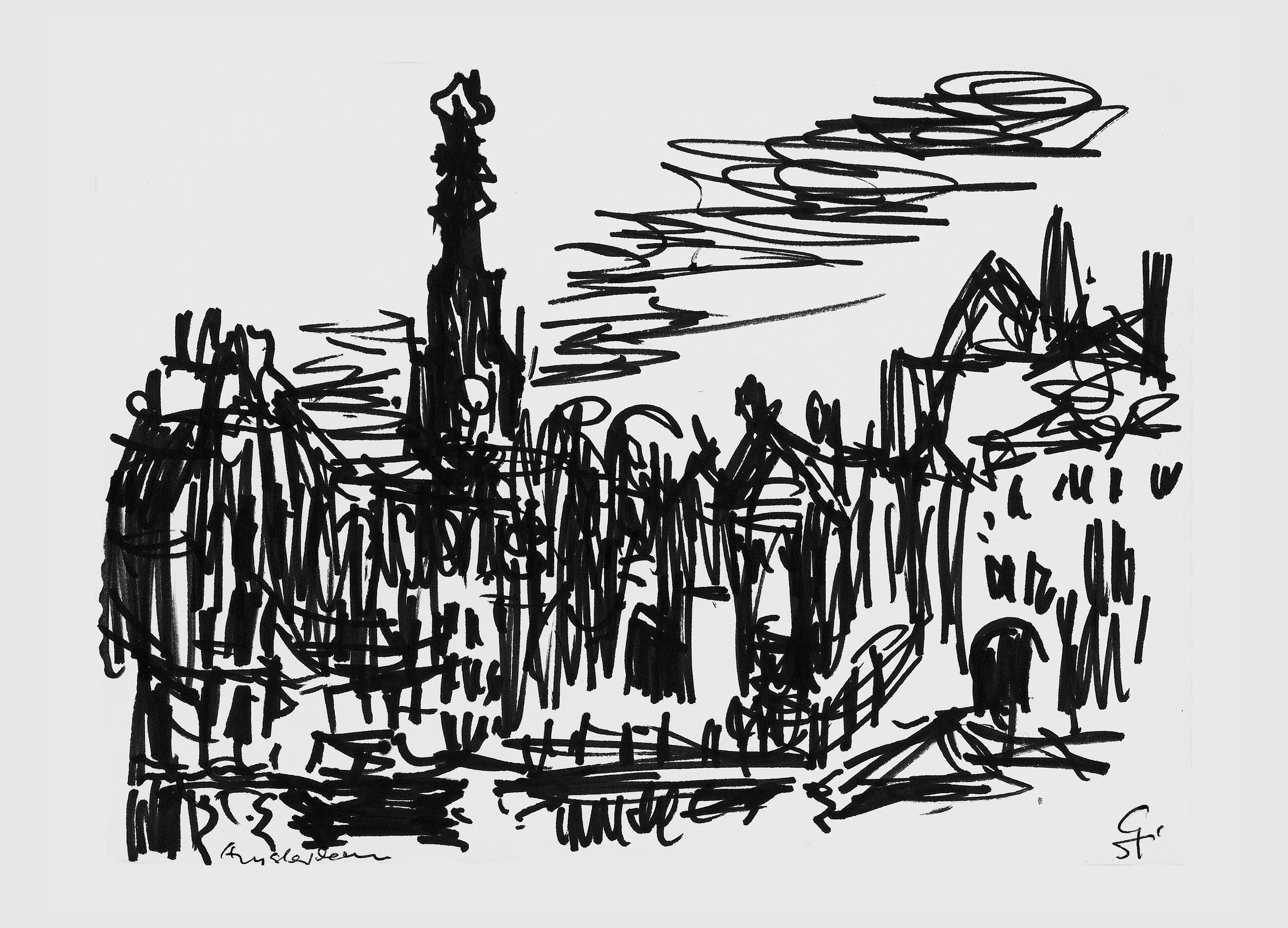 Tuschezeichnung von Amsterdam, 1993 von Gerhard Stengel, Skizzenbuch 1993